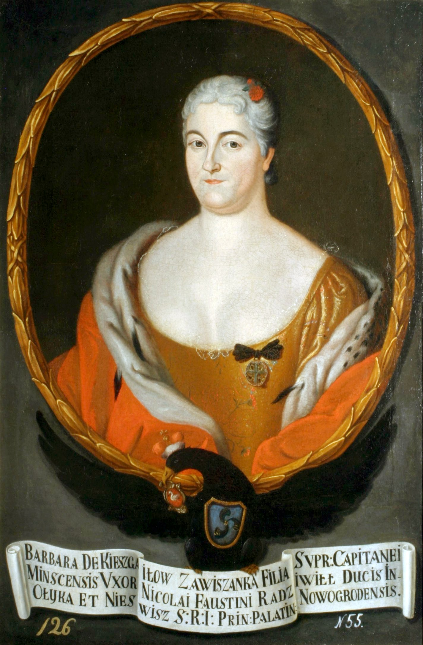 Беларуская (тарашкевіца): Партрэт Барбары Радзівіл (Barbara Radzivił) з роду Завішаў (Zaviša)